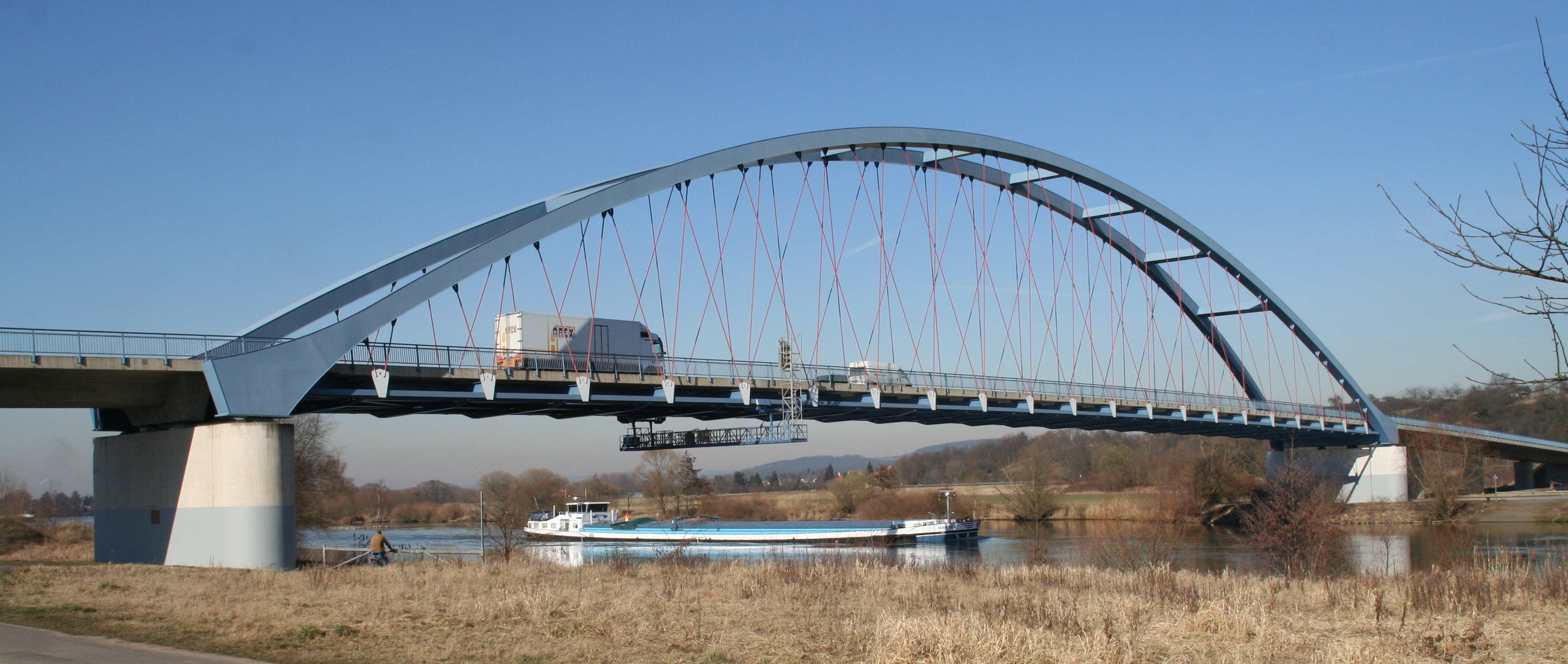 Neue Mainbrücke Niedernberg-Sulzbach, Kreis Miltenberg, in Unterfranken